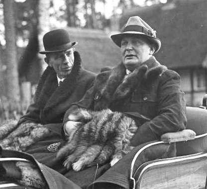 Lord [Edward Frederik ]Halifax bei Göring in der Schorfheide 20.11.37